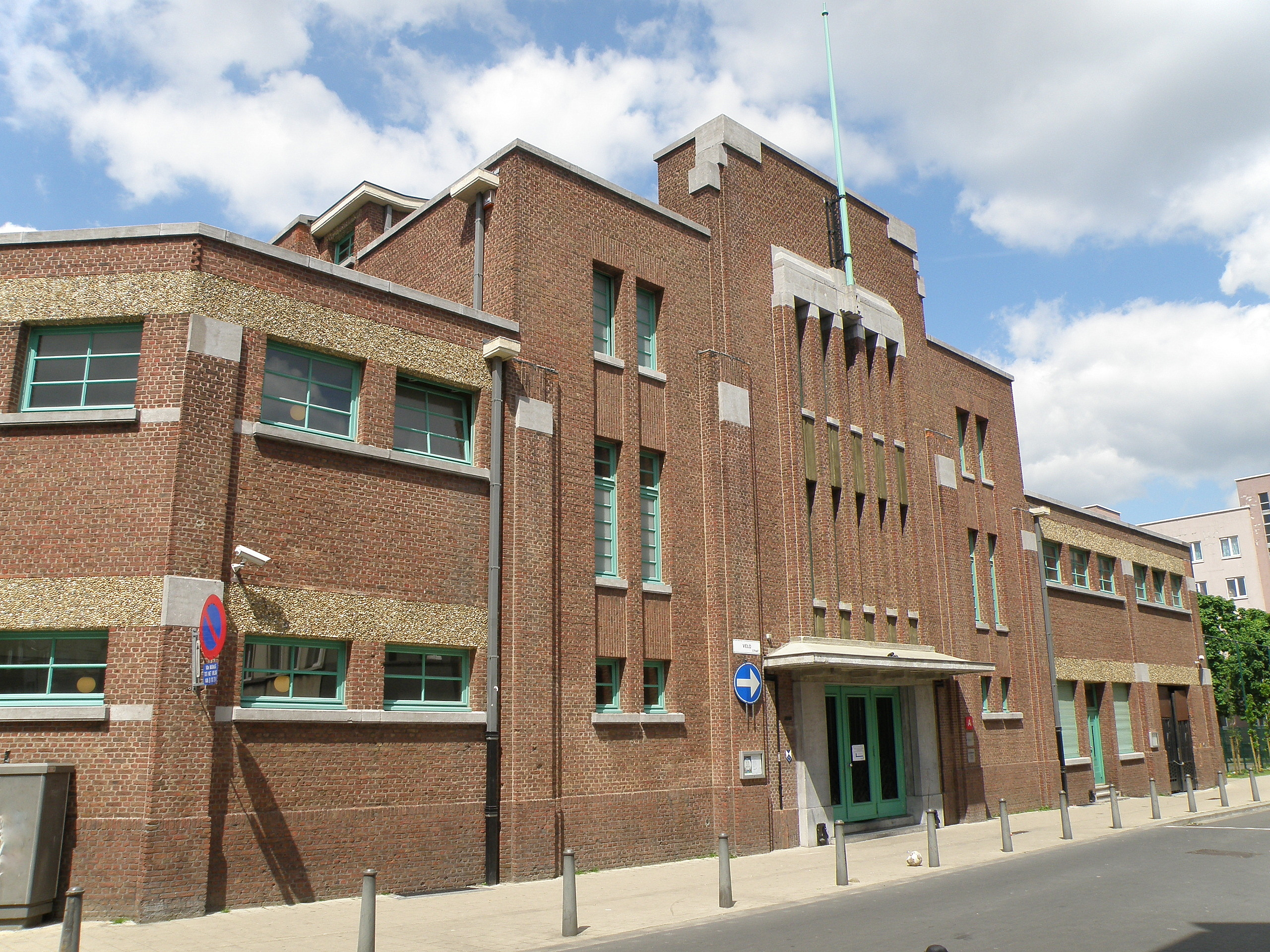 Antwerpen, België. Stedelijk zwembad, thans (na renovatie) genaamd Sportoase, gelegen aan de Veldstraat in de wijk Stuivenberg, anno 1926 gebouwd in Art deco-stijl n.o.v. Jan van Asperen, Emiel van Averbeke en Joseph Algoet.